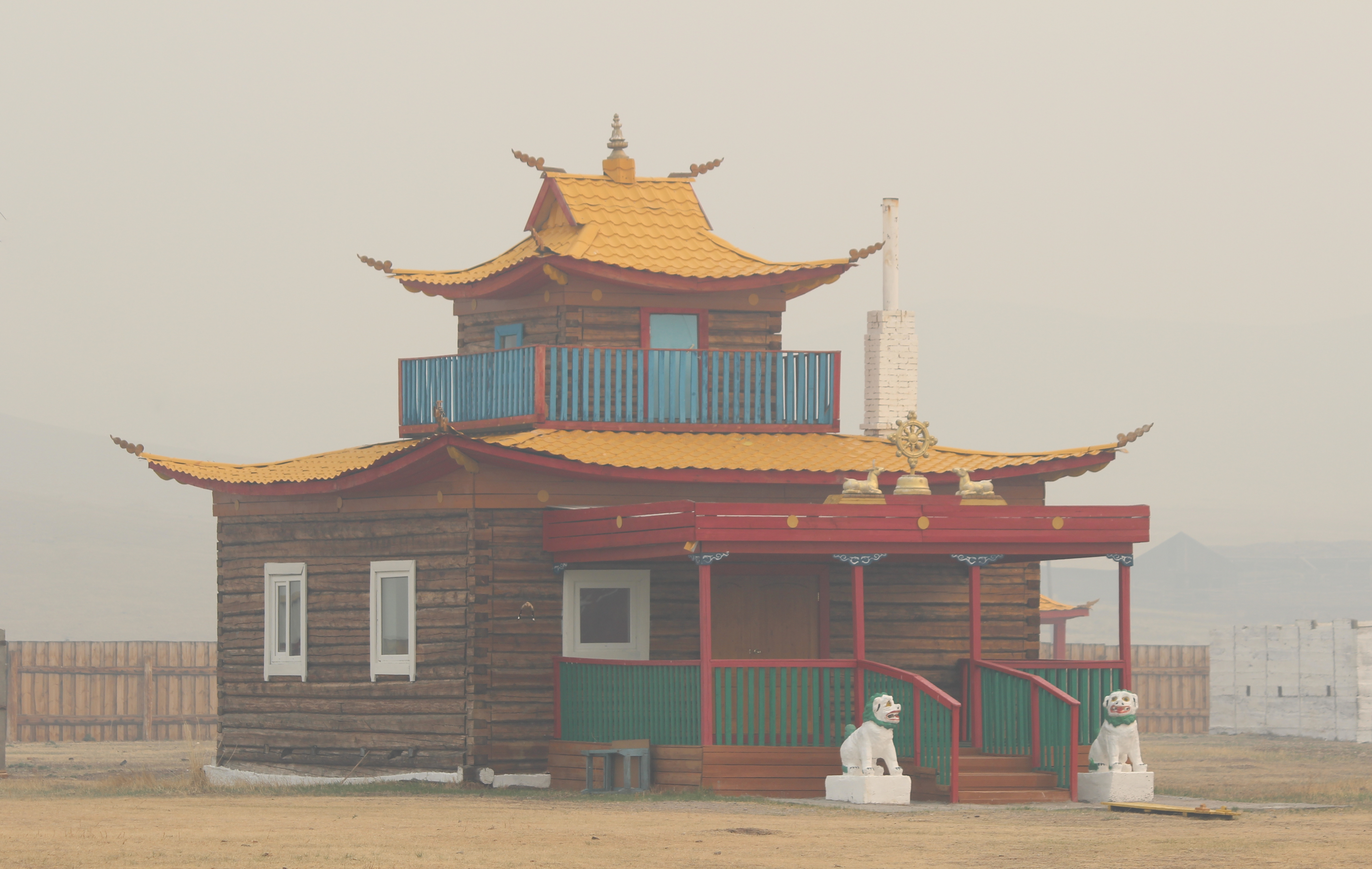 Табангут-Ичётуйский дацан, село Нижний Ичётуй, Джидинский район, Бурятия